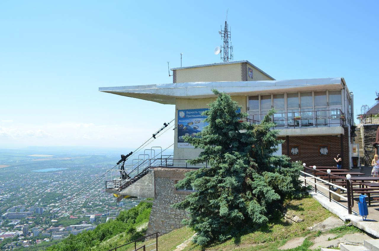 Верхняя станция канатной дороги на горе Машук